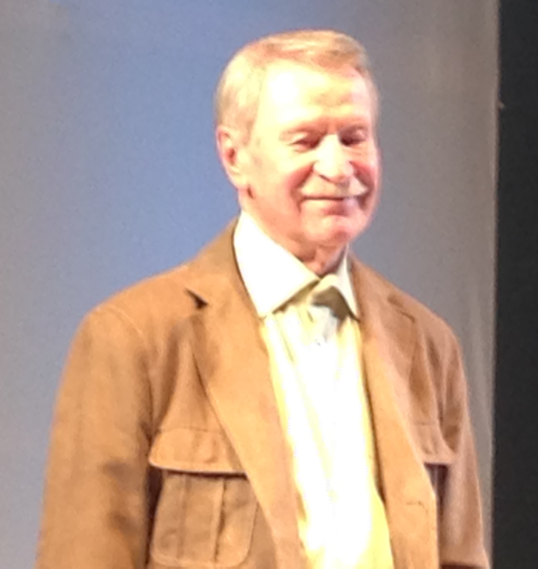 Актёр Иван Краско в роли Эмиля Гайденрейха в спектакле «Эрос» Театра имени В. Ф. Комиссаржевской